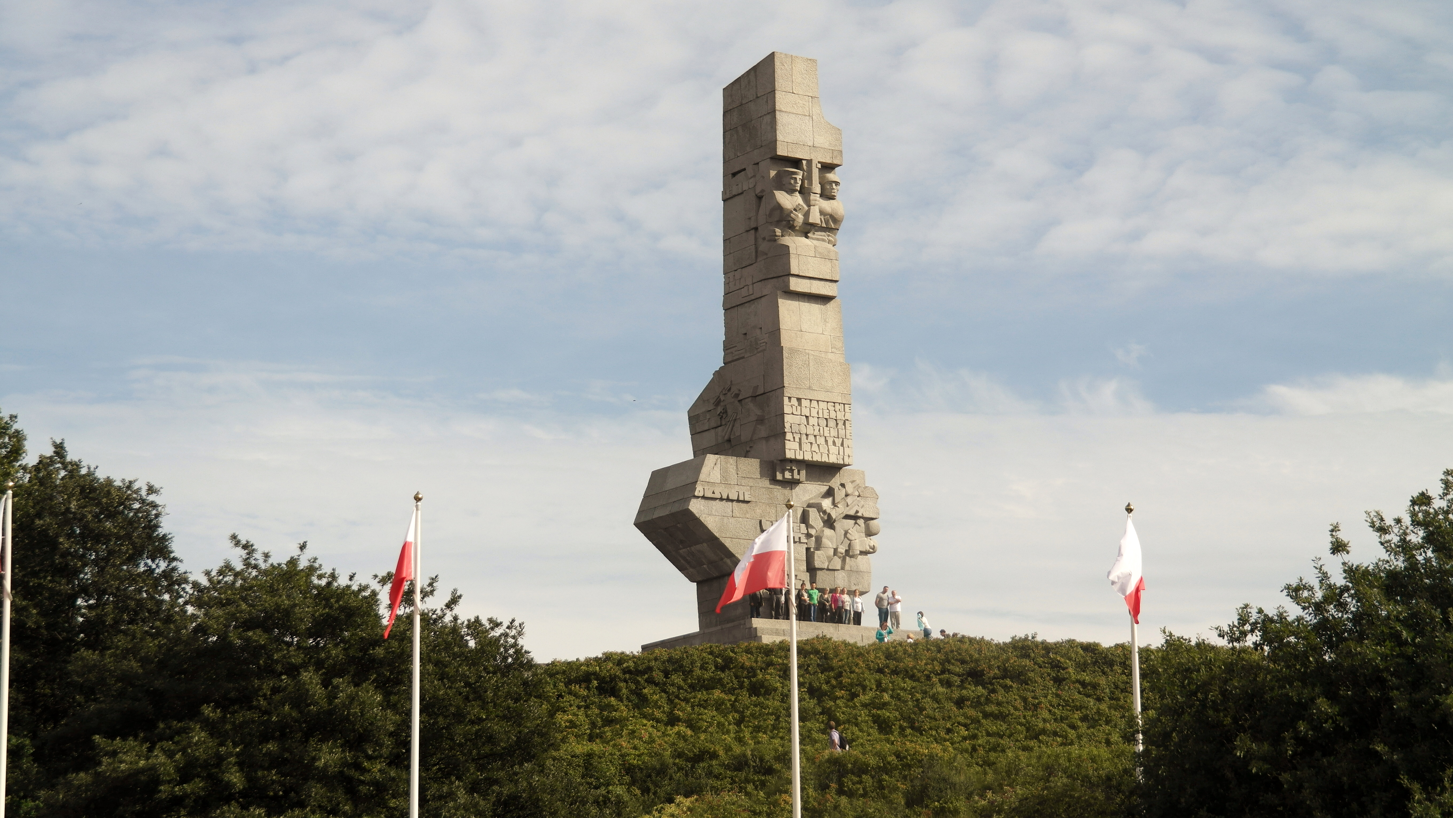 SAMSUNG CSC